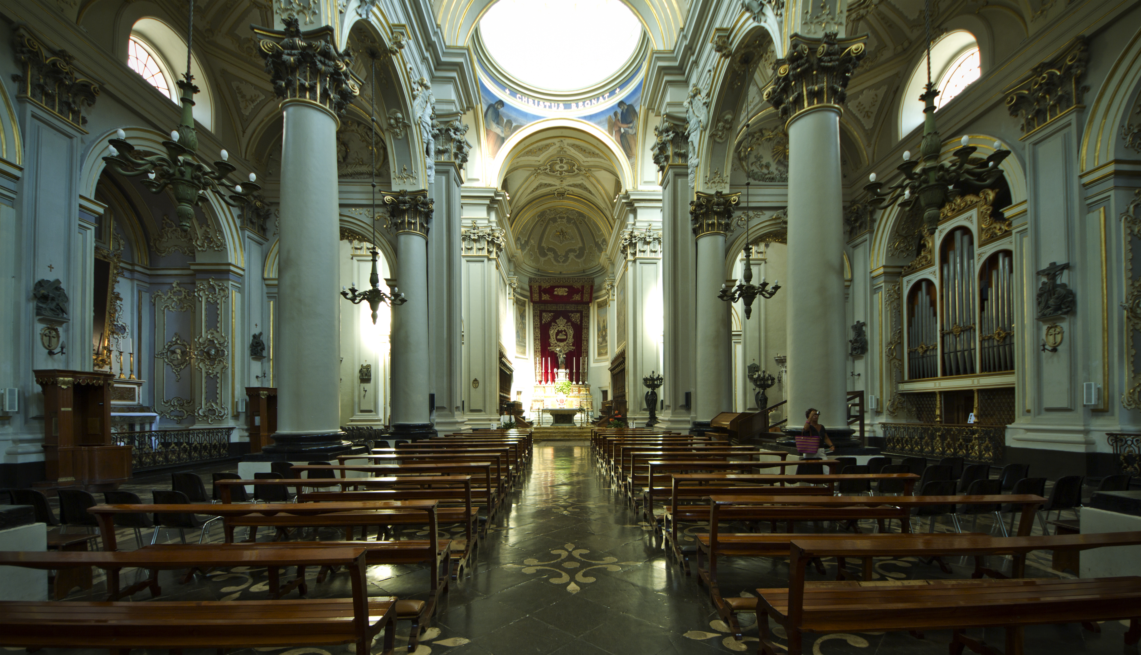 Chiesa di Santa Maria delle Scala